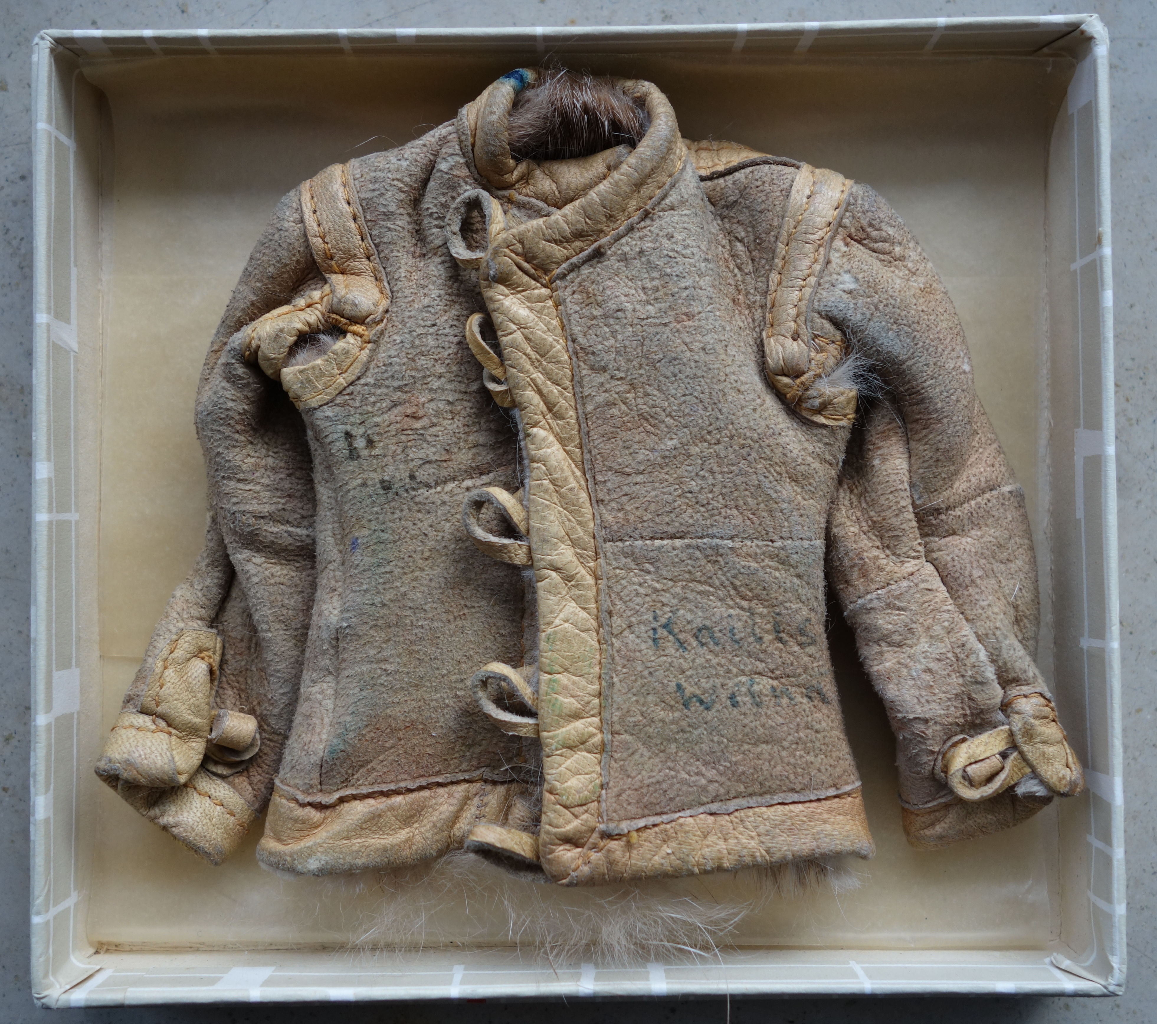 Kaninfell-Miniaturjäckchen. Beschriftet "Kailis Wilna". Aus der Sammlung eines Pelzveredlers und Pelzhändlers, der während des 2. Weltkriegs in Litauen als Fachmann der Pelzbranche für die Pelzproduktion im Rang des so genannten „Sonderführers“ tätig war. Zu seiner Aufgabe gehörte, zusammen mit einem Lederfachmann, die Gerberei- und Lederbetriebe technisch zu überwachen, für die Einhaltung der Produktionspläne zu sorgen und fachmännischen Rat zu erteilen. Sie waren für die Heranschaffung des notwendigen Rohmaterials, die Bereitstellung der erforderlichen Arbeitskräfte und für den ordnungsgemäßen technischen Ablauf der Produktion verantwortlich. Außerdem hatten sie die Aufgabe, die deutschen Zivilisten in Kowno mit Schuhwerk und Winterpelzen zu versorgen. - Näheres über das Felljäckchens selbst ist nicht bekannt. Kartongröße: 14 x 12,5 cm In der Pelzfabrik Kailis in Wilna (Vilnius, der Hauptstadt von Litauen), befand sich ein Lager für Zwangsarbeiter (Eröffnung des Lagers September 1943; Schließung 03. Juli 1944).